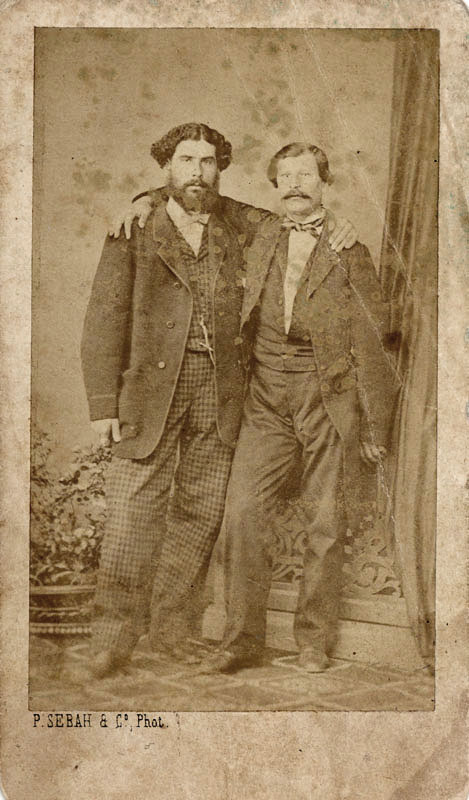 Революционерът Павел Грамадов (1822 - 1877) и учителят в първото българско училище във Варна Димитър Станчев (24.06.1847 - 12.12.1905).